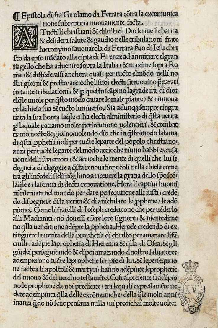 carta *1r